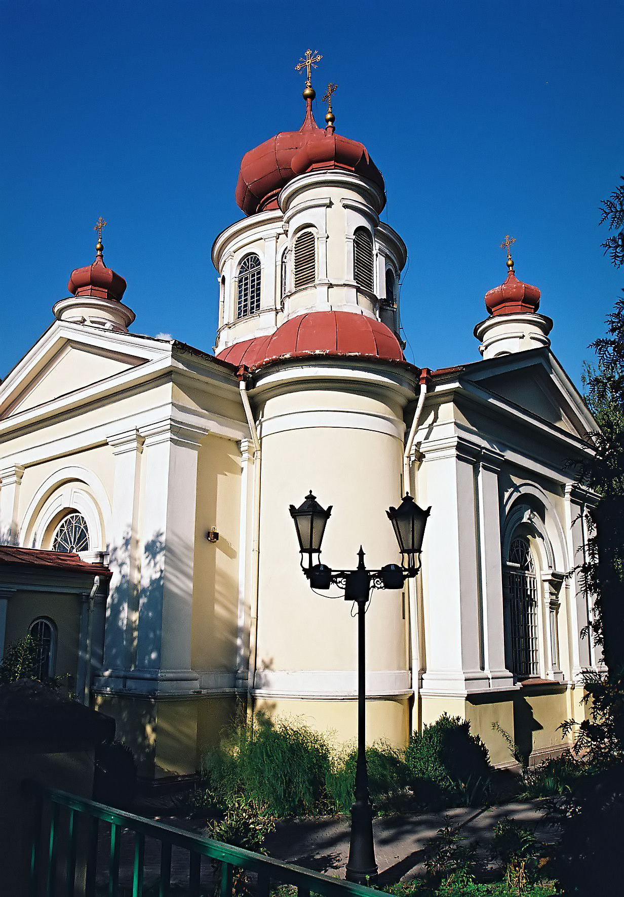 Chełm